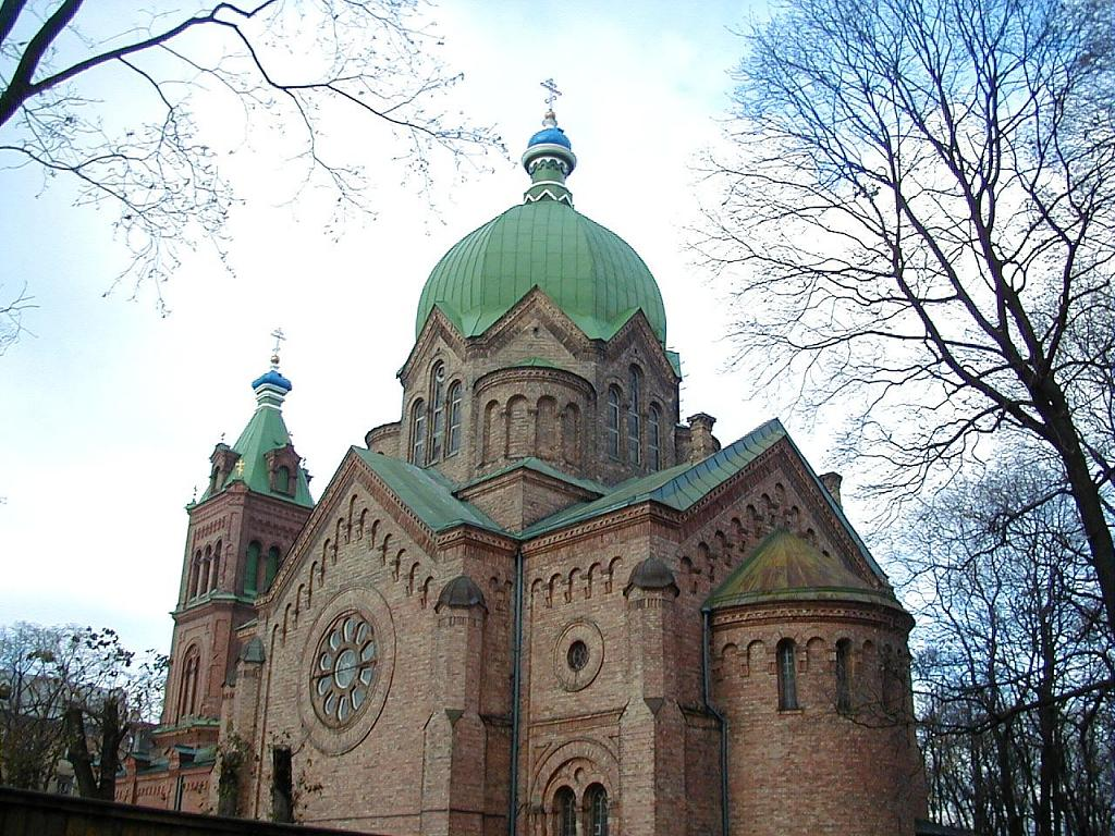 Rīga, Visu Svēto pareizticīgo baznīca 2002-11-03